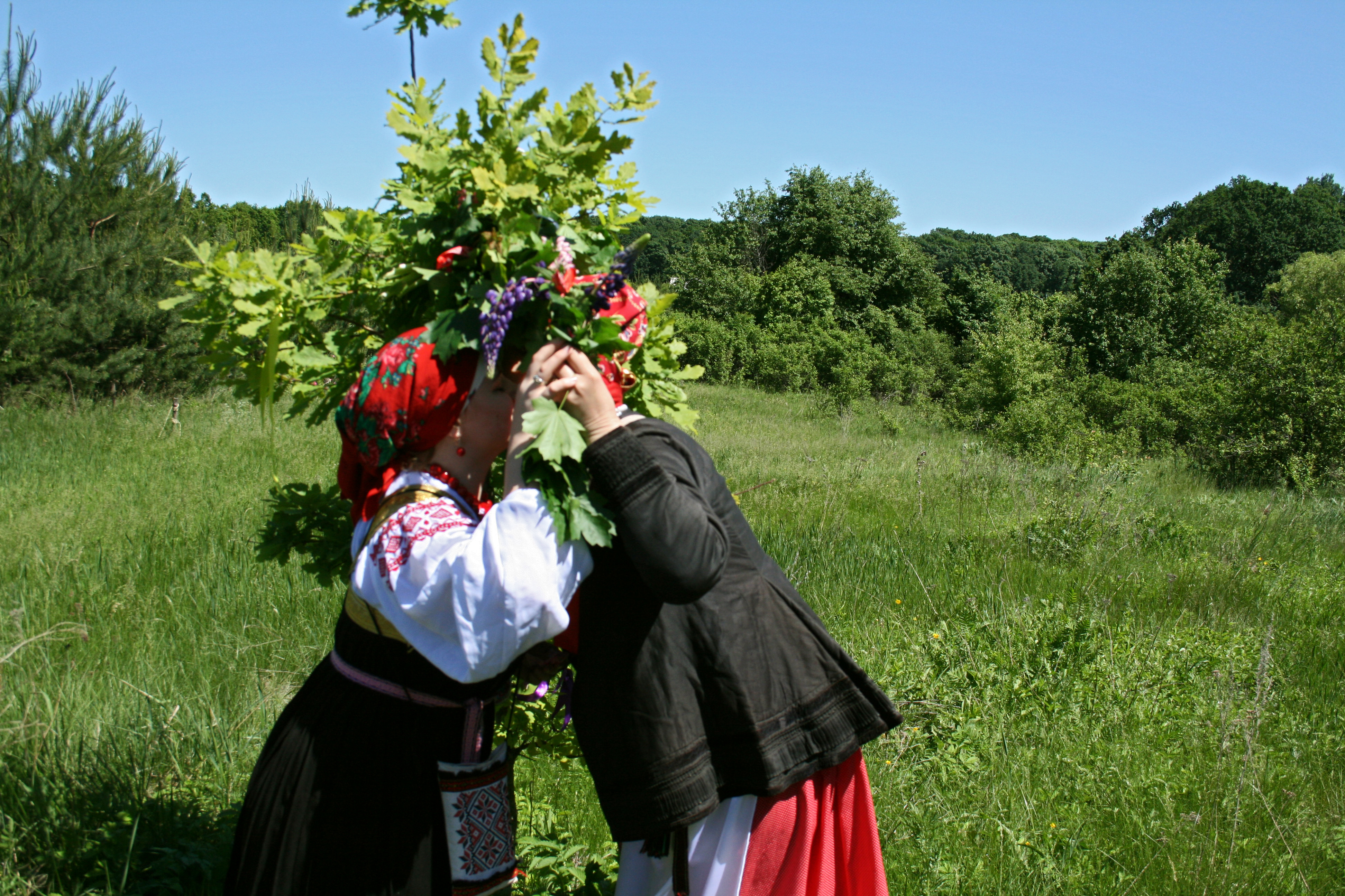 Троица в поселении «Коеньские родники», 2018